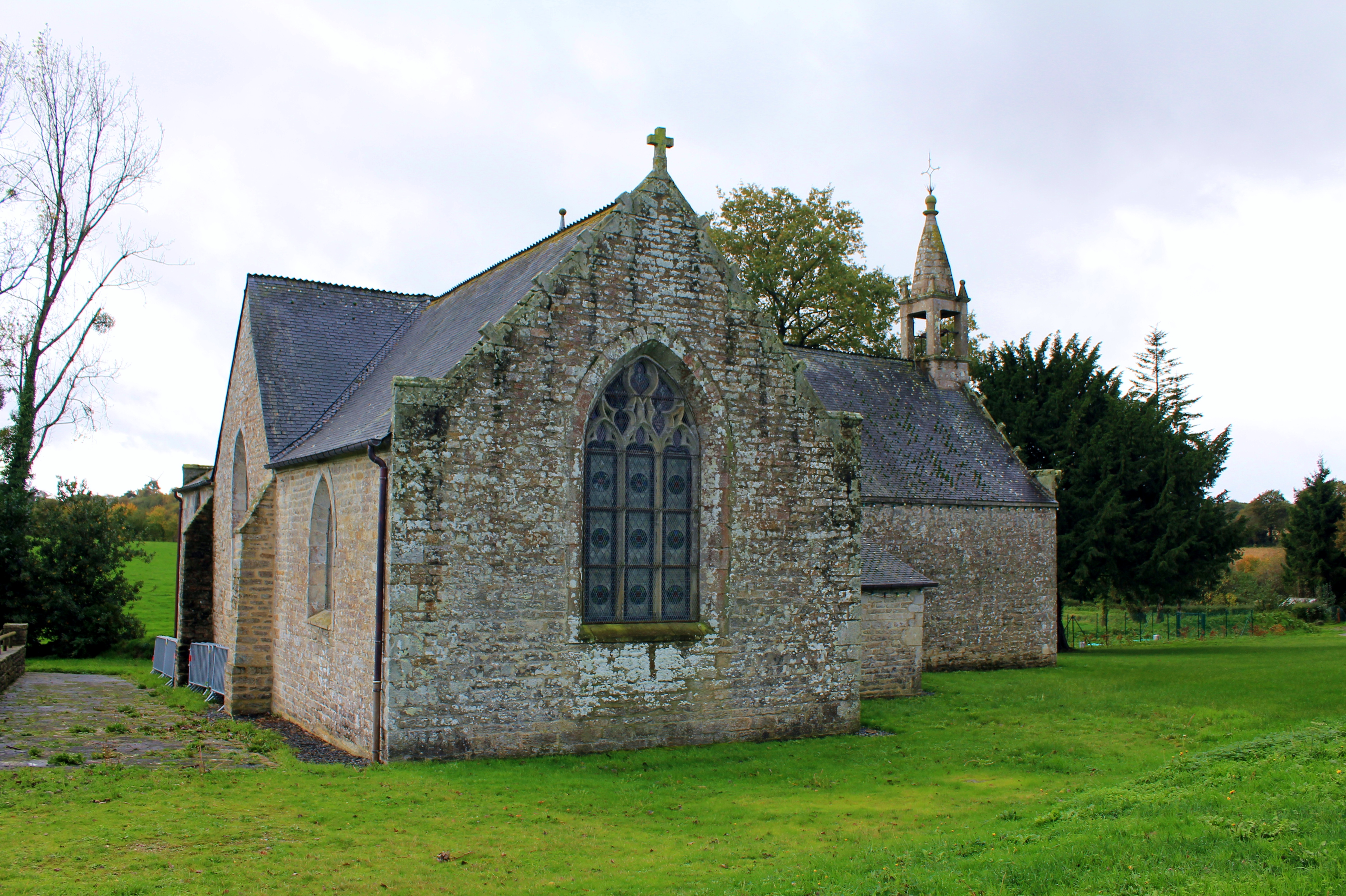 Chapelle Sainte-Anne (Buléon) : vue depuis le nord-est